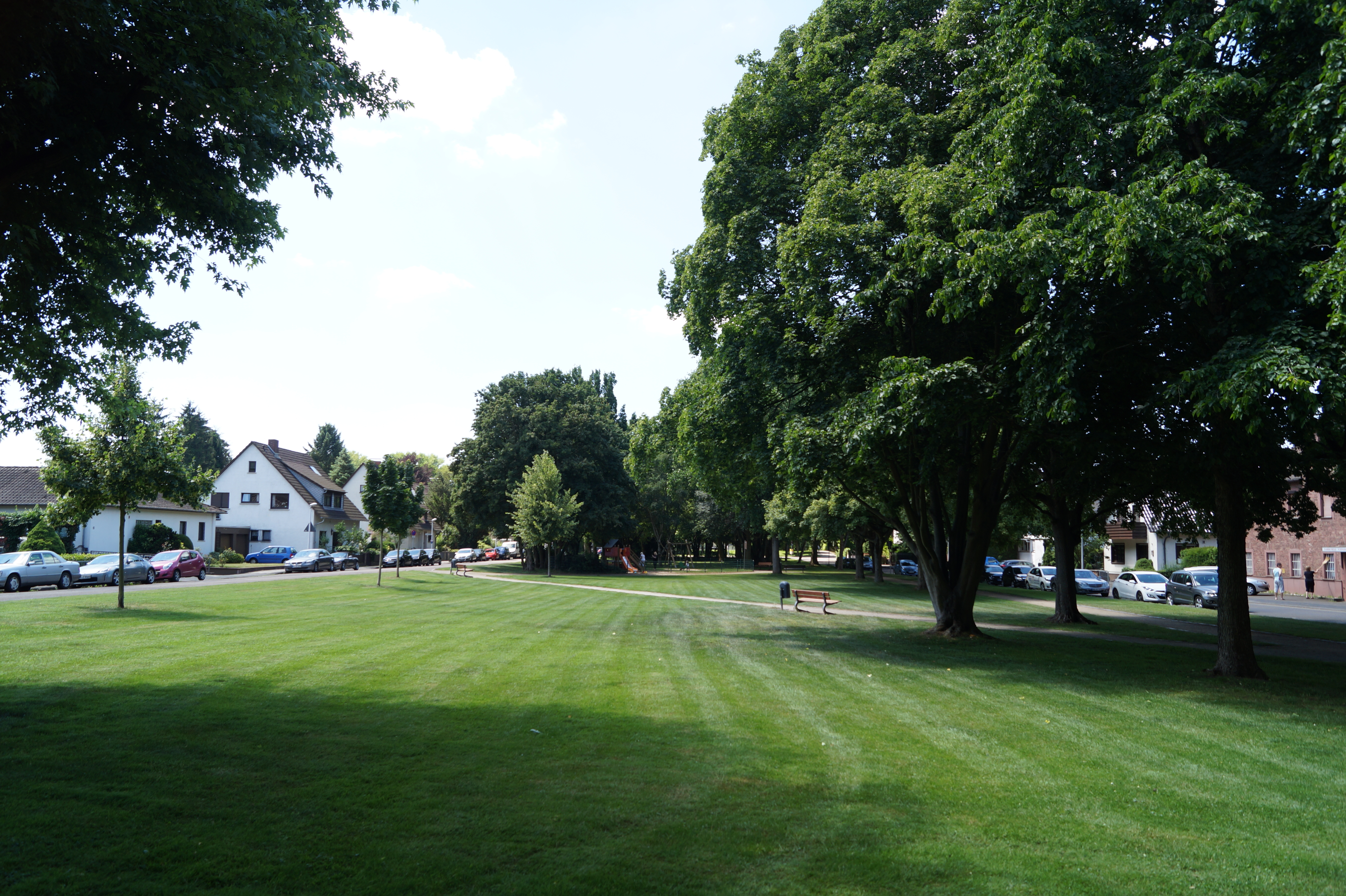 Ansicht des ehemaligen Mainkanals in Hanau, heute Grünfläche; Blickrichtung Main.